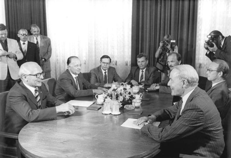 ADN-ZB Zimmermann 27.5.88 Berlin: Erich Honecker empfing Alfred Dregger Der Generalsekretär der ZK der SED und Vorsitzende des Staatsrates der DDR, Erich Honecker, empfing den Vorsitzenden der Fraktion der CDU/CSU im Deutschen Bundestag, Alfred Dregger (vorn rechts), im Amtssitz des Staatsrats. Ganz rechts der Leiter der Ständigen Vertretung der BRD in der DDR. Dr. Hans-Otto Bräutigam, 2.v.l. Staatssekretär Frank-Joachim Herrmann, Leiter der Kanzlei des Vorsitzenden des Staatsrates. 3.v.l. der Abteilungsleiter des ZK der SED Gunter Rettner.